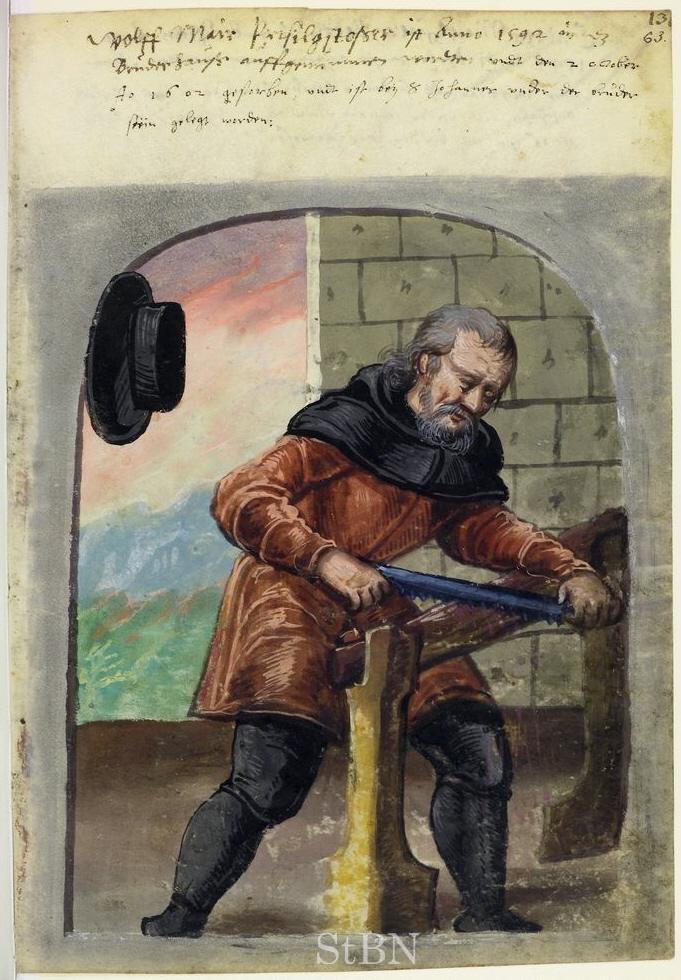 Transkription und weitere Informationen Wolff (Wolf; Wolfgang) Mair (Mayr; Mayer; Meier; Meir; Meyer), Prisilgstoßer (Brasilholzstoßer; gewinnt den Farbstoff Brasilin)